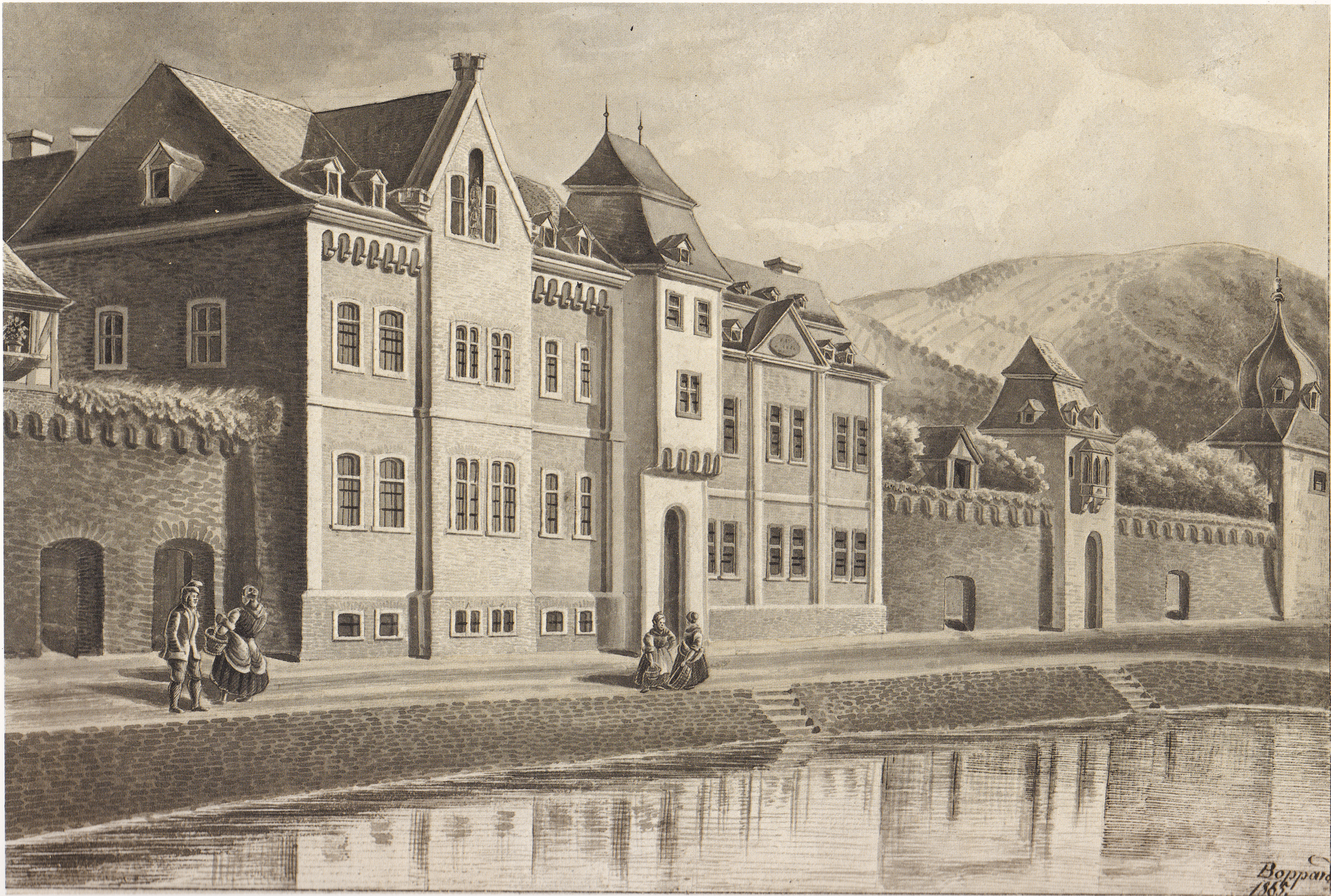 Weisenhaus und Hospital zum Heiligen Geist in Boppard im Jahr 1865